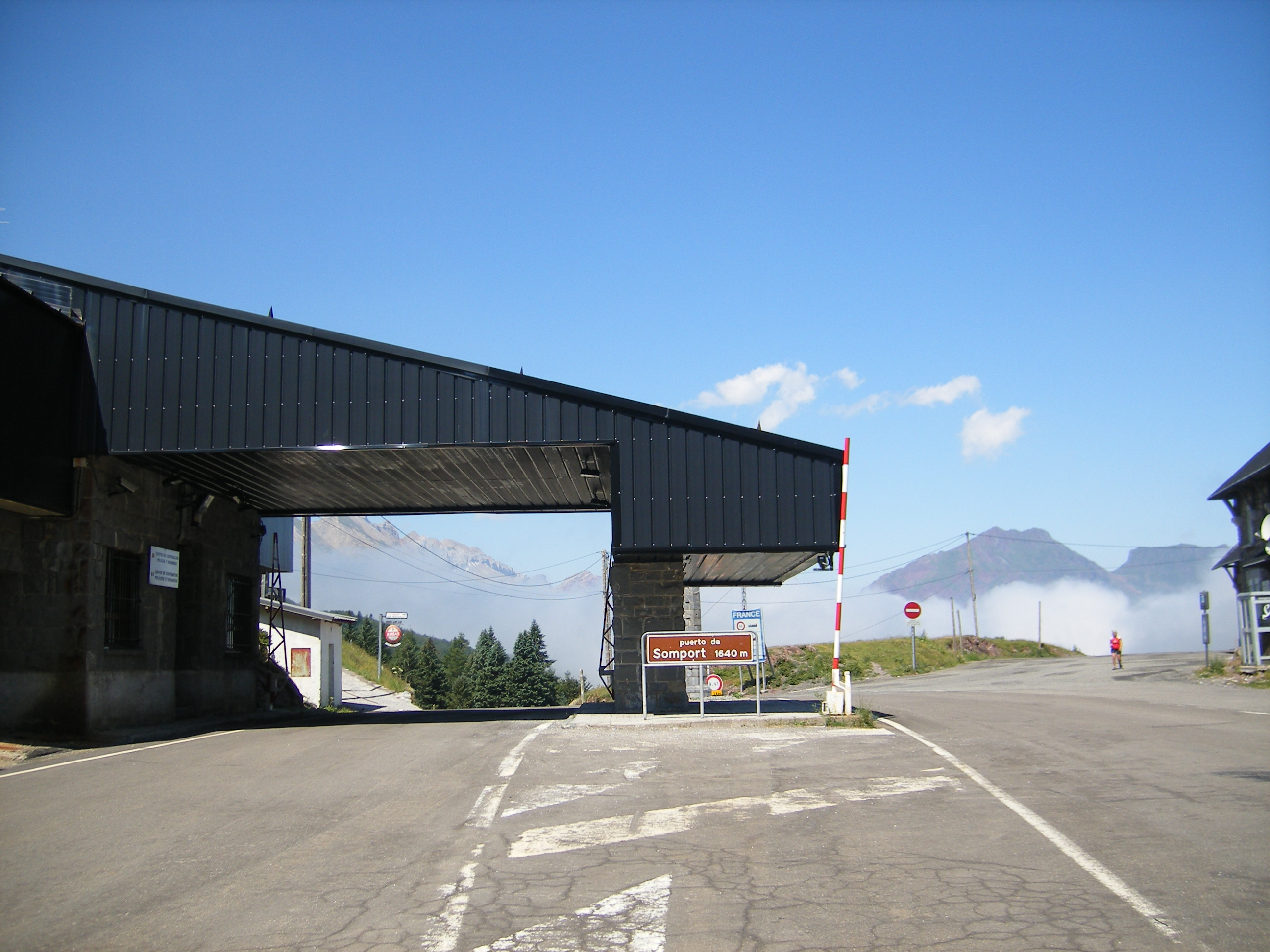 Aragonés: Muga d'o Somport dende Uesca (Aragón).